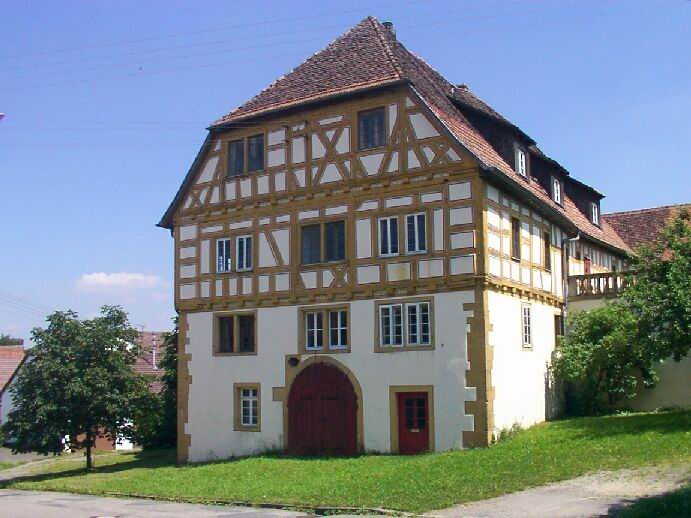 Schloss Neunstetten